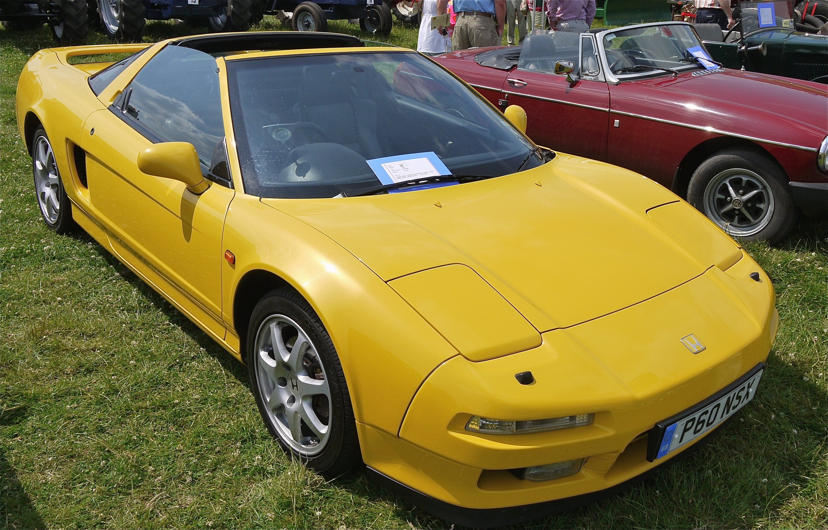 Panasonic G1 14-45 Lens